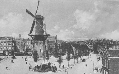 Oostplein in Rotterdam. Foto van prentbriefkaart uit nl:1913, fotograaf onbekend